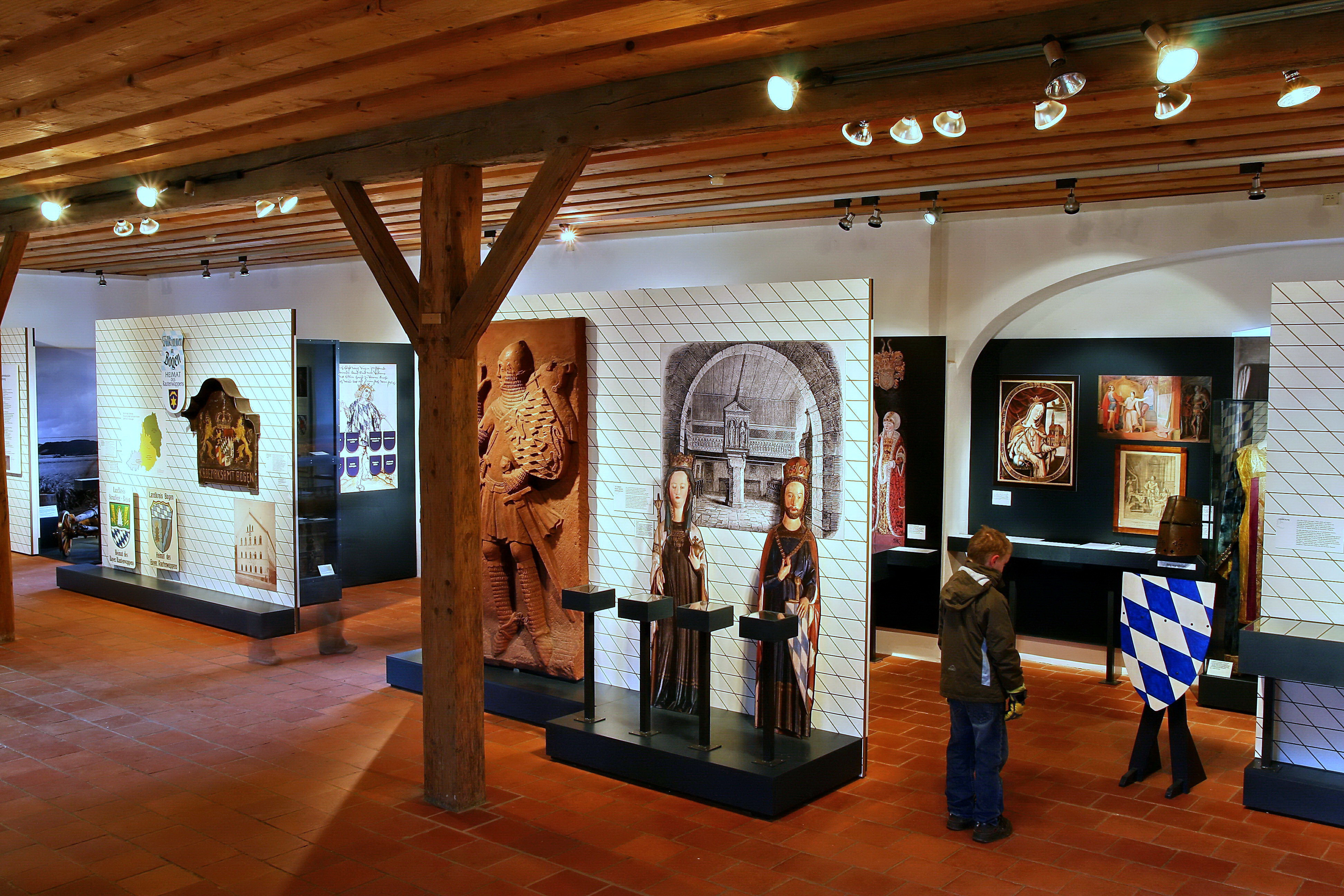 Kreismuseum Bogenberg. Dauerausstellung im Erdgeschoss. Die Bayerischen Rauten und ihre Herkunft von den Grafen von Bogen.